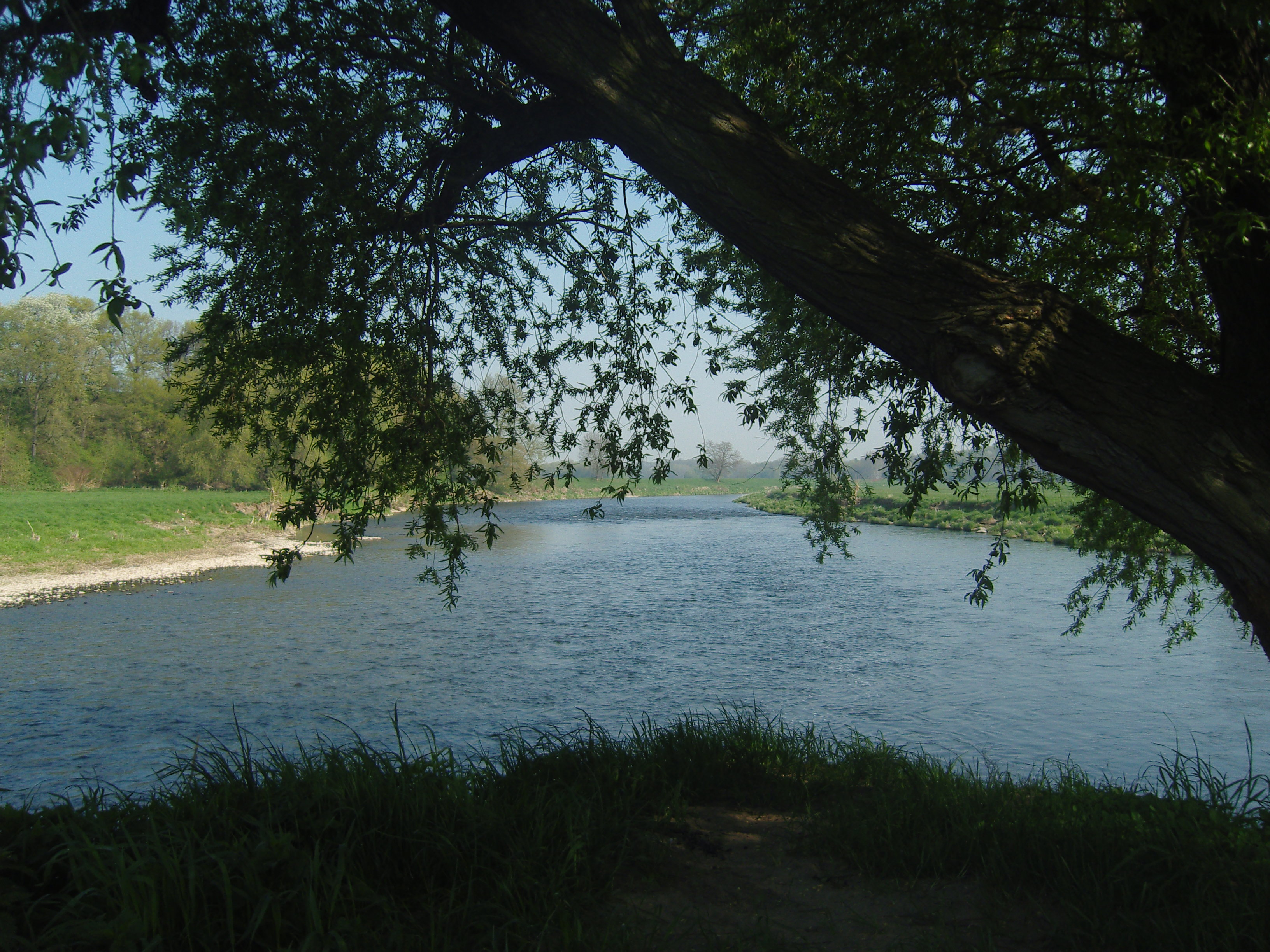 Zusammenfluss von Zwickauer und Freiberger Mulde zur Mulde